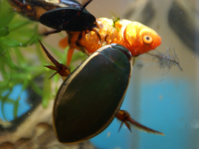 Divingbeetles